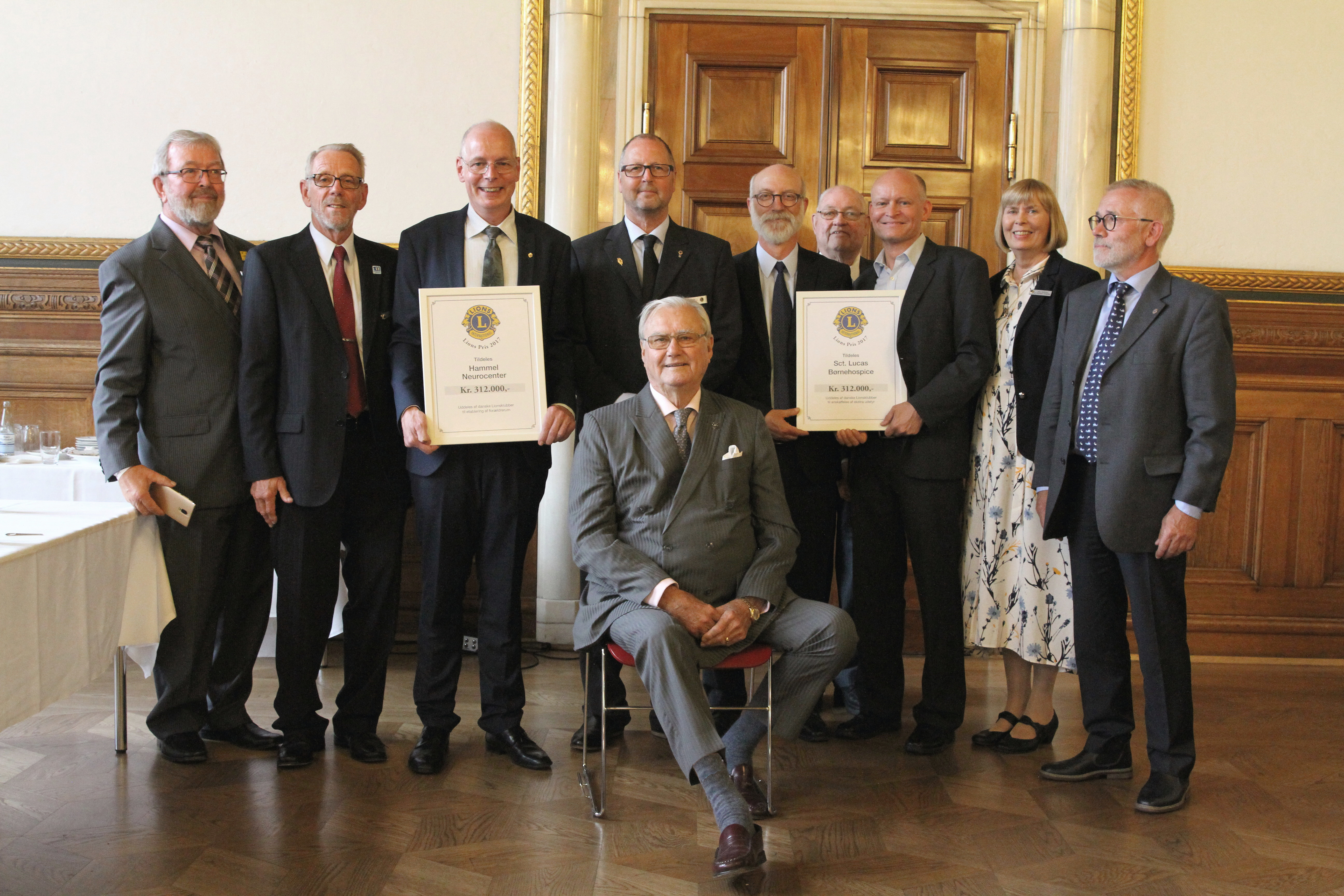 HKH Prins Henrik med årets prismodtagere på Københavns Rådhus 2017